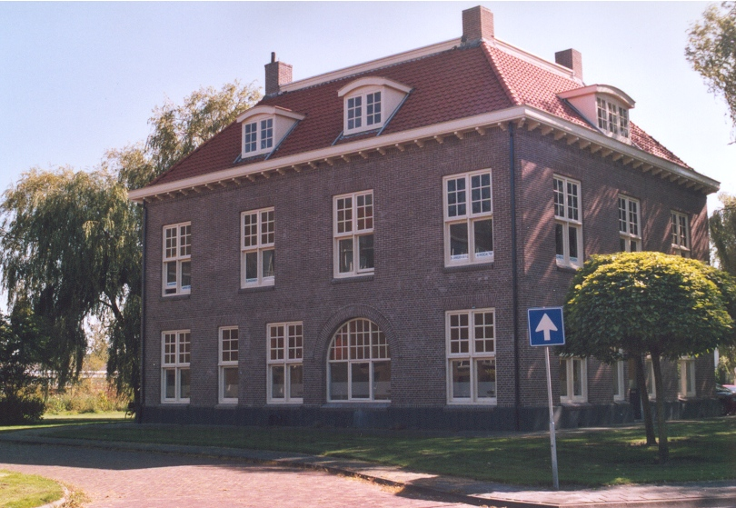 Foto van het voormalig hoofdstation van de Stoomtramweg-Maatschappij Oostelijk Groningen te Winschoten tevens hoofdkantoor.